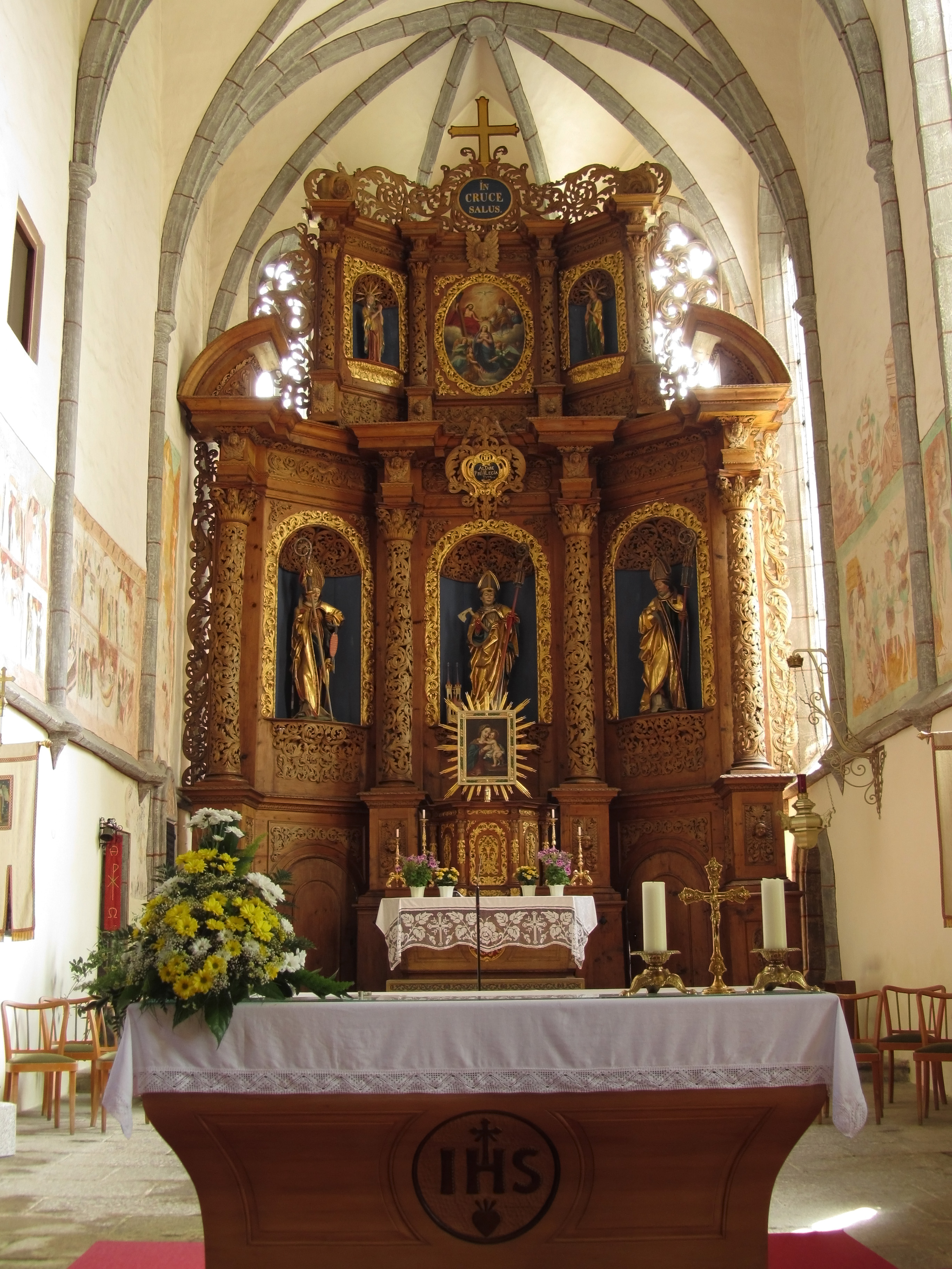 Barocker Altar von Balthasar Threyer aus den Jahren 1692-1694, welcher drei künstlerisch wertvolle monumentale Holzplastiken von um 1490 enthält, darstellend die heiligen Erasmus, Wolfgang und Nikolaus.